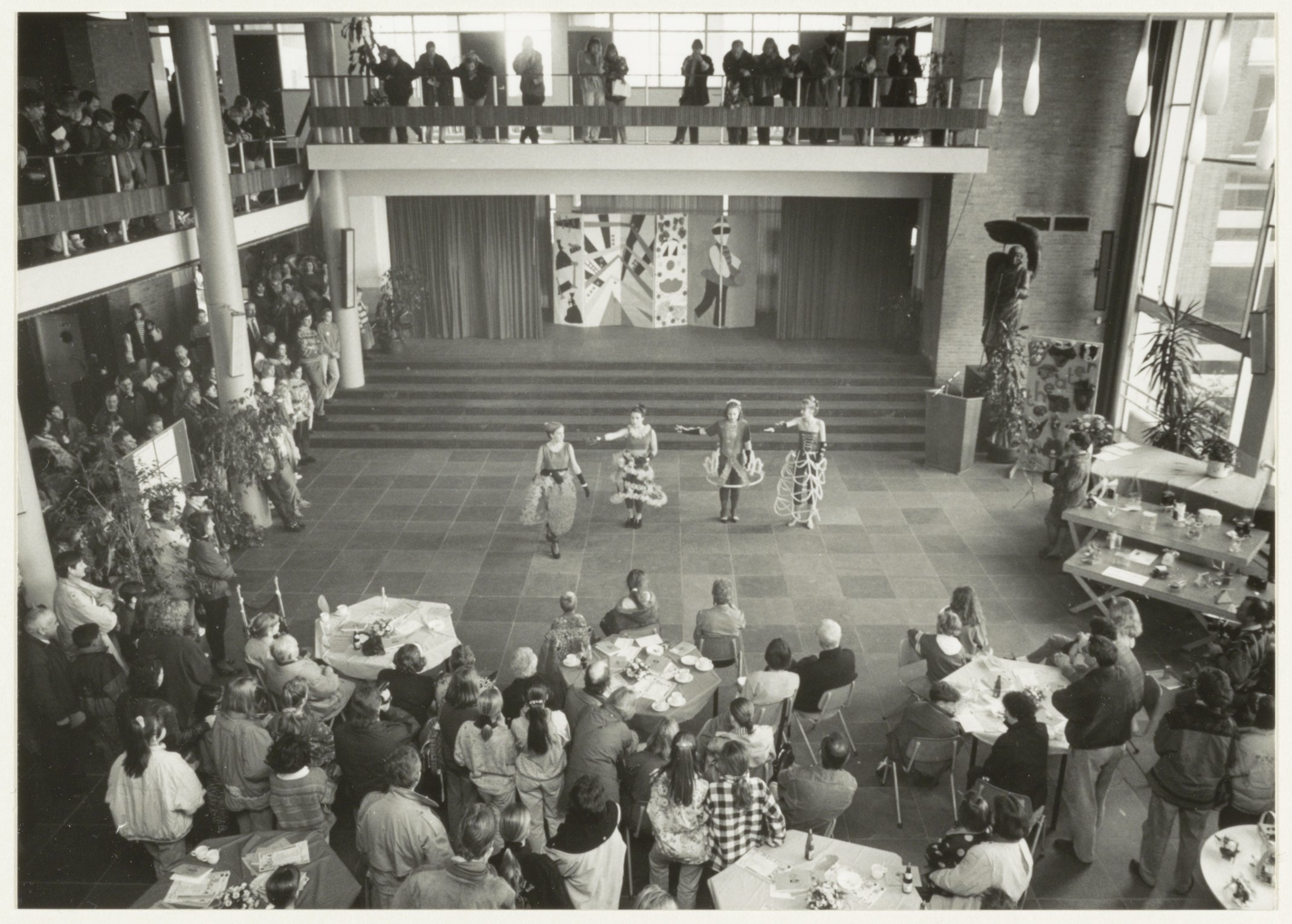 CollectieCollectie Fotoburo de BoerInventarisnummerNL-HlmNHA_54032109NL-HlmNHA_1478_35827kBeschrijvingModeshow van leerlingen met textiel in het vakkenpakket, op de open dag van Lyceum Sancta Maria.FotonummerNL-HlmNHA_1478_4875DocumenttypeHistorieprenten, tekeningen en foto'sVervaardigerStapel, Babette (UP de Boer) Soort vervaardigerFotograaf AnnotatiesHD 100292LandNederland ProvincieNoord-Holland GemeenteHaarlem PlaatsHaarlem StraatVan Limburg Stirumstraat Begindatum08-02-1992Einddatum08-02-1992TechniekFoto Trefwoordenscholen